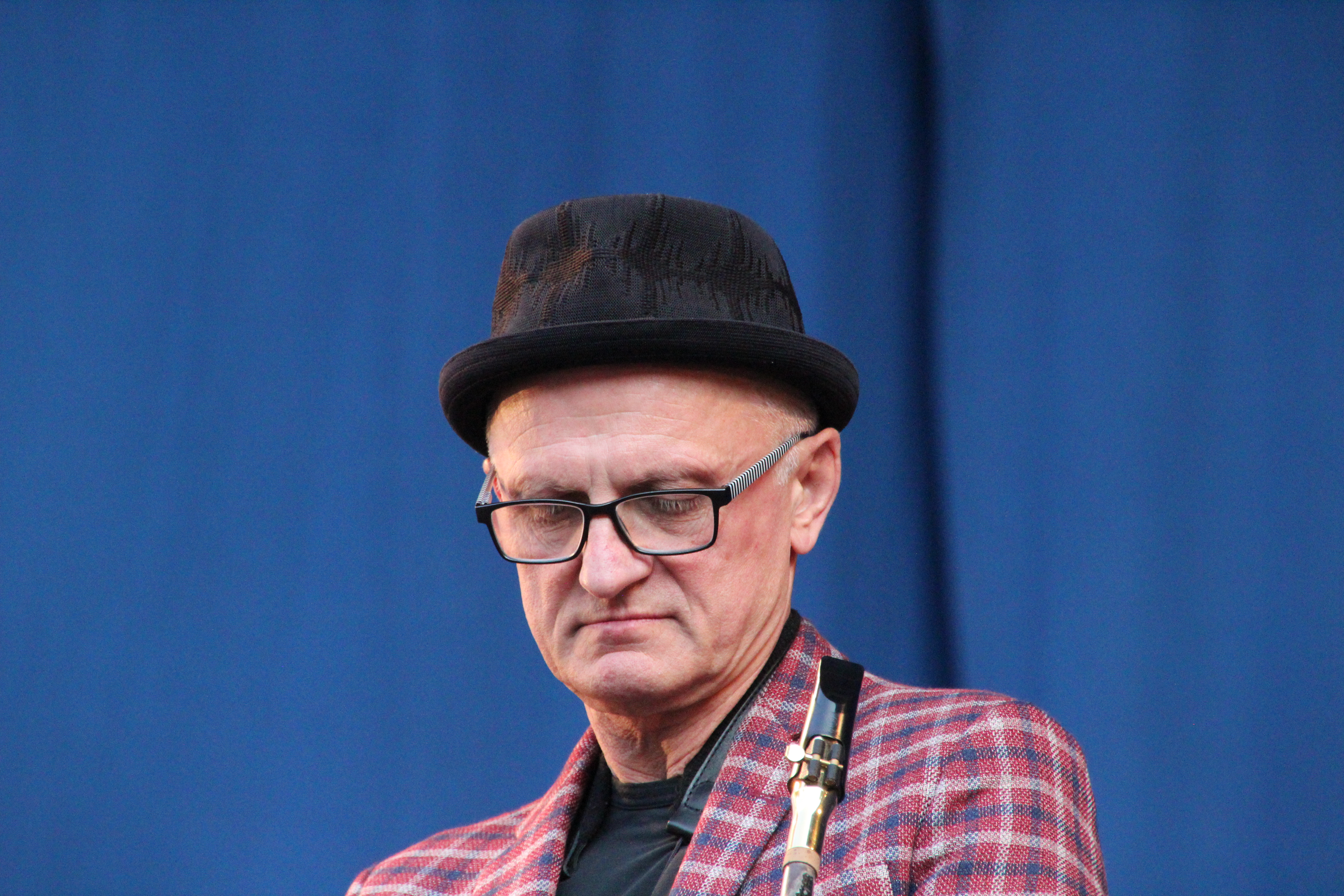 Bildinhalt: Andrzej Olejniczak bei einem Auftritt mit dem European Blue Note Quartet im Frankfurter Palmengarten Aufnahmeort: Frankfurt am Main, Deutschland Die dargestellte Person wurde bei einem öffentlichen Auftritt fotografiert.